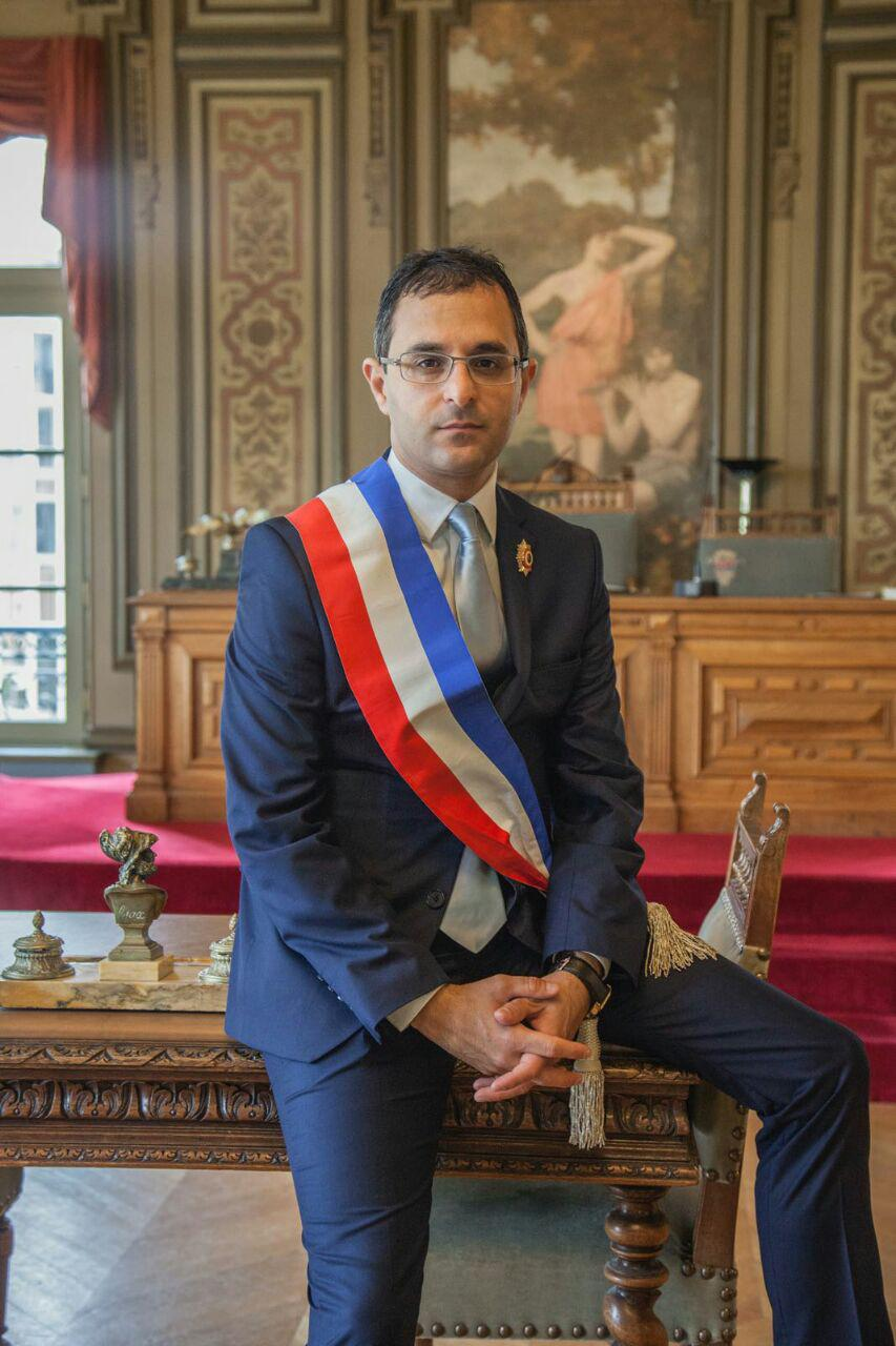 تصویر آرش درم بخش که توسط بنده امروز عکاسی شد.